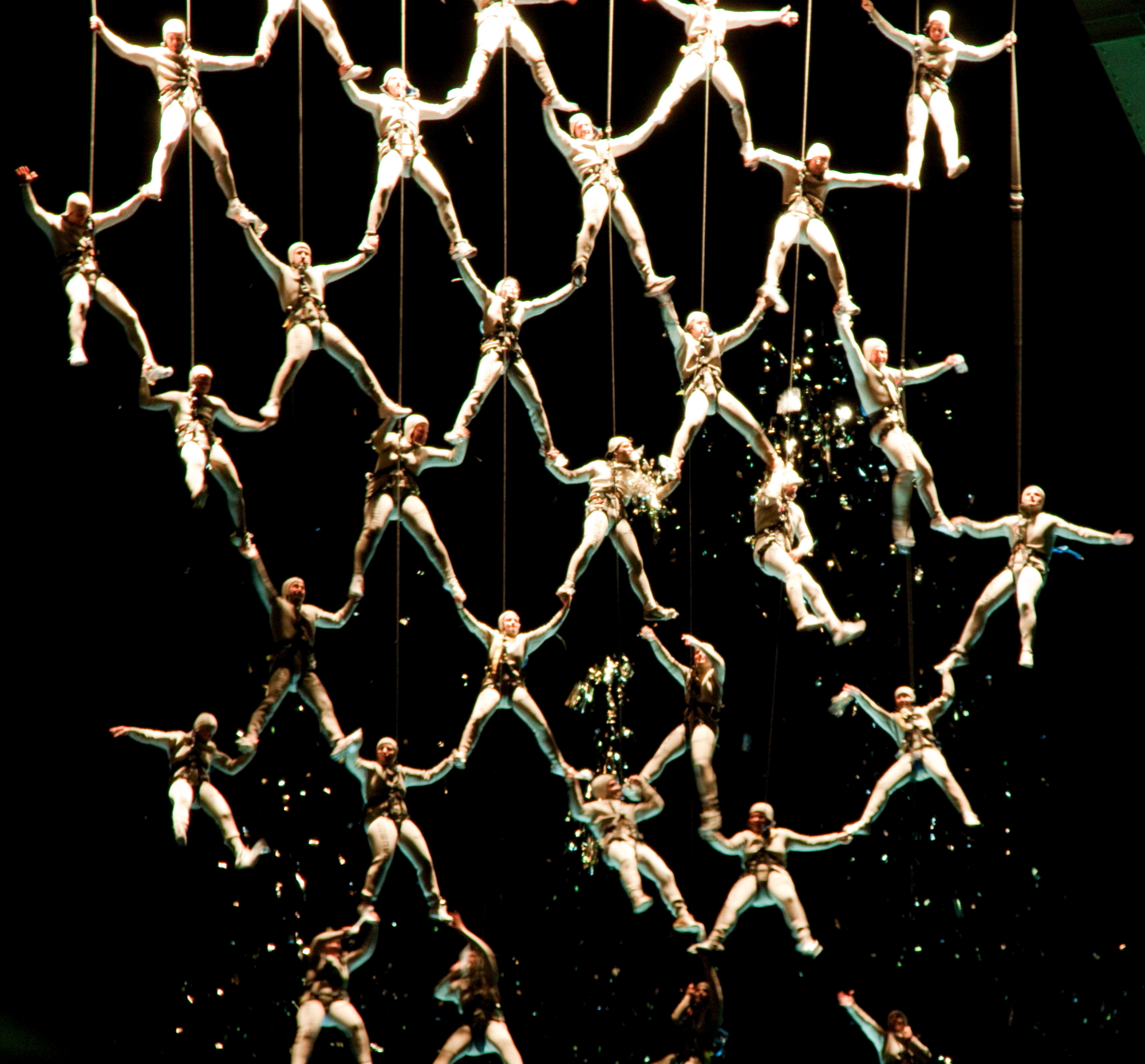 Las Fura dels Baus in Dreams In Flight.